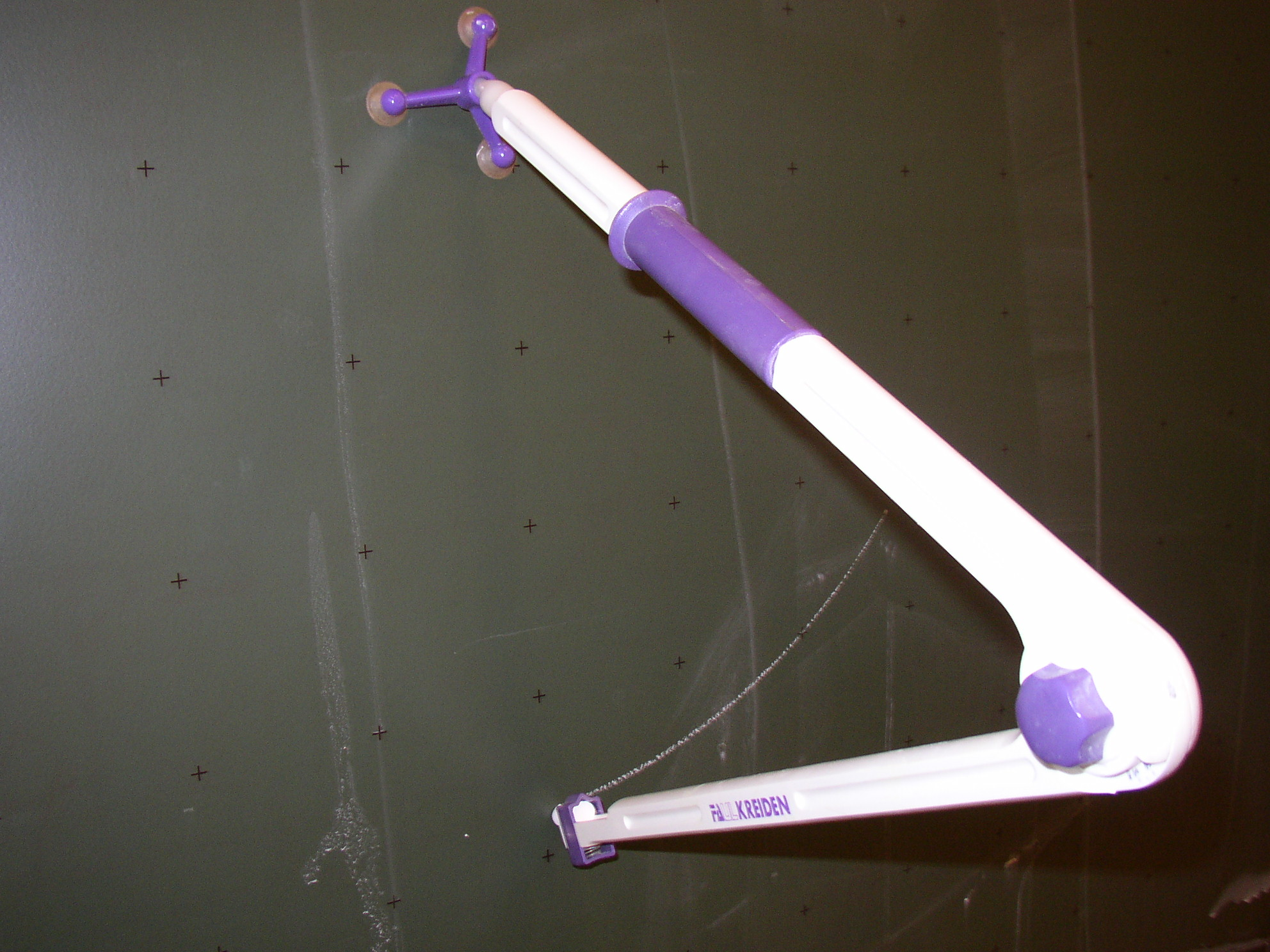 Tafelzirkel